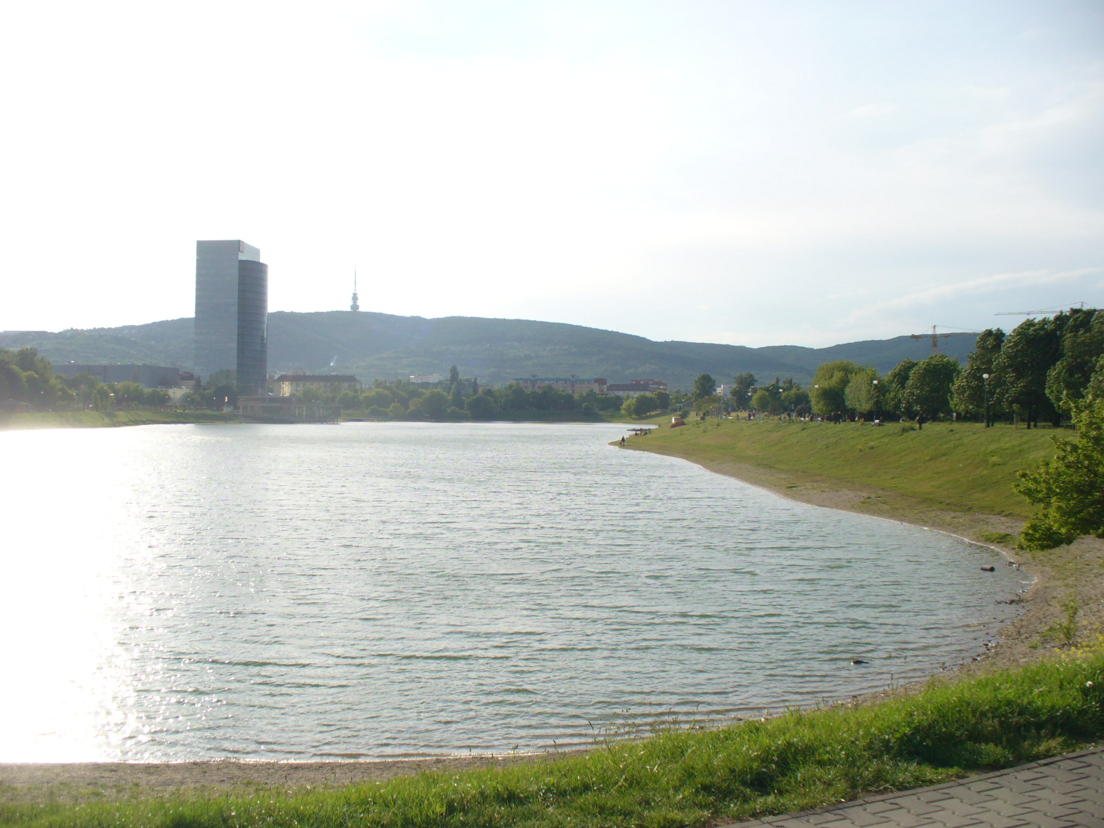 Kuchajda lake, Bratislava, Slovakia